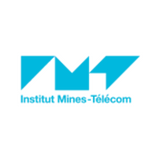 logo de l'IMT - Mines Télécom